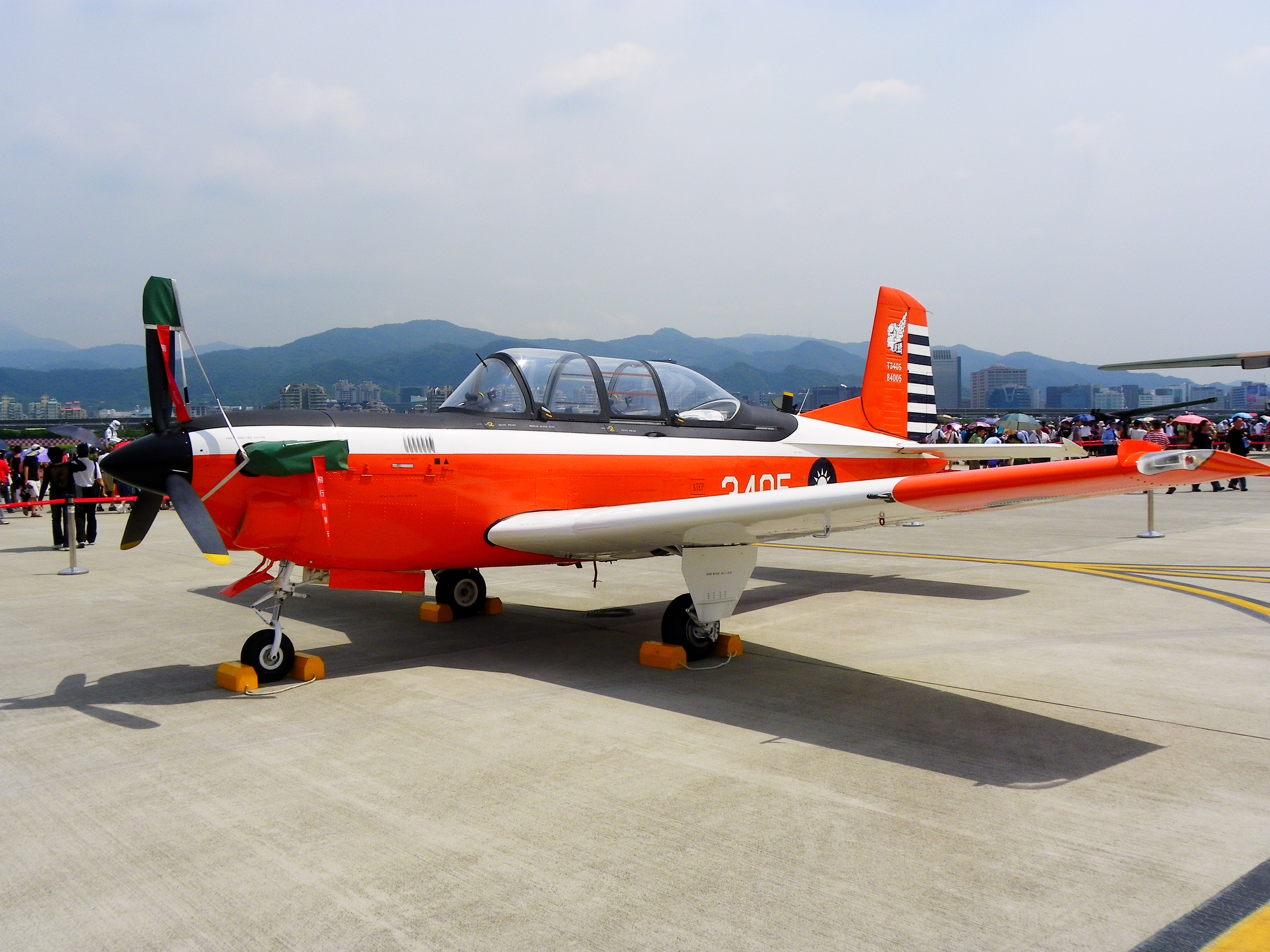 2011年8月13日空軍松山基地開放活動中，展示之T-34C教練機 3405。